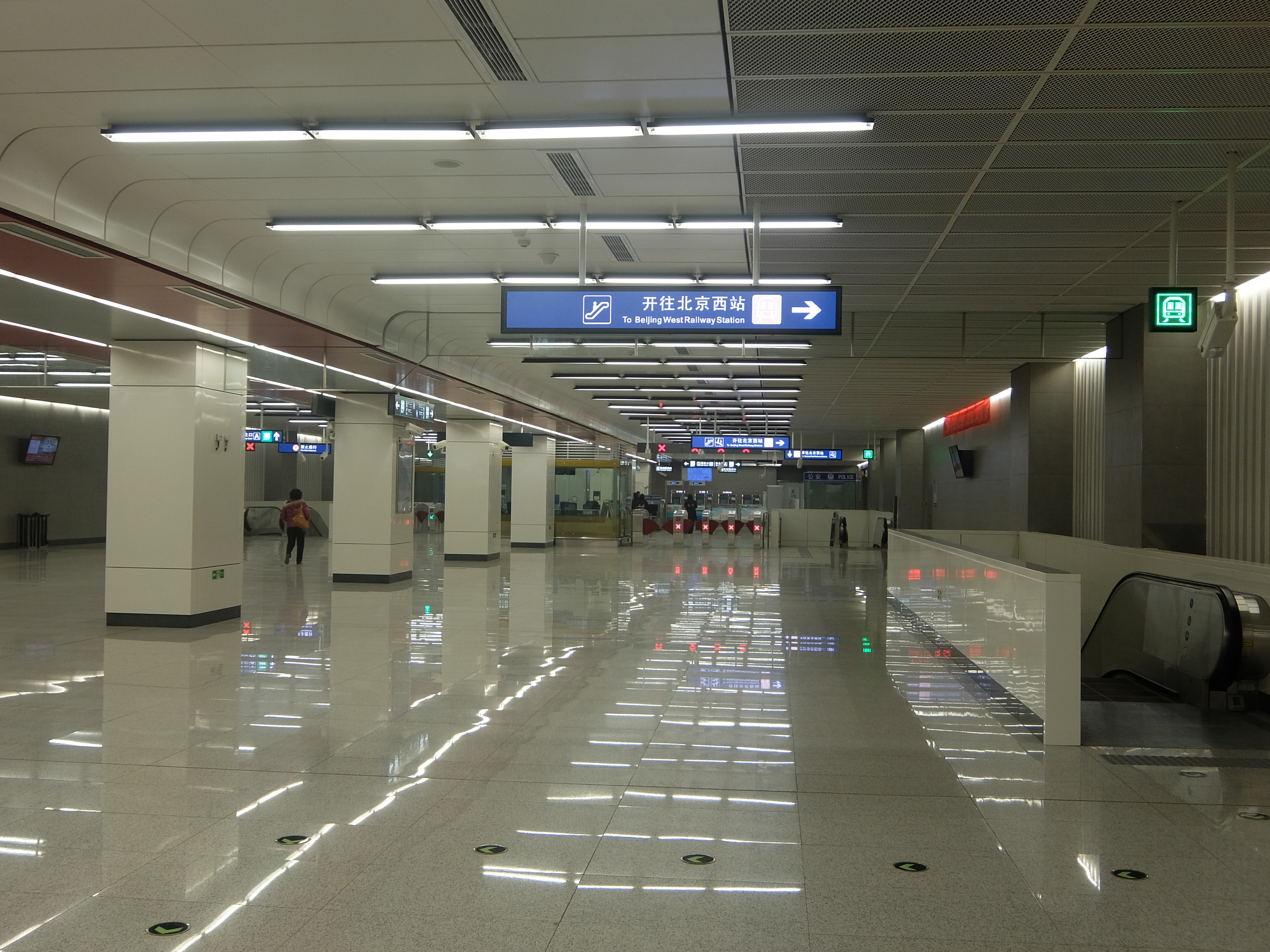 北京地铁7号线焦化厂站站厅